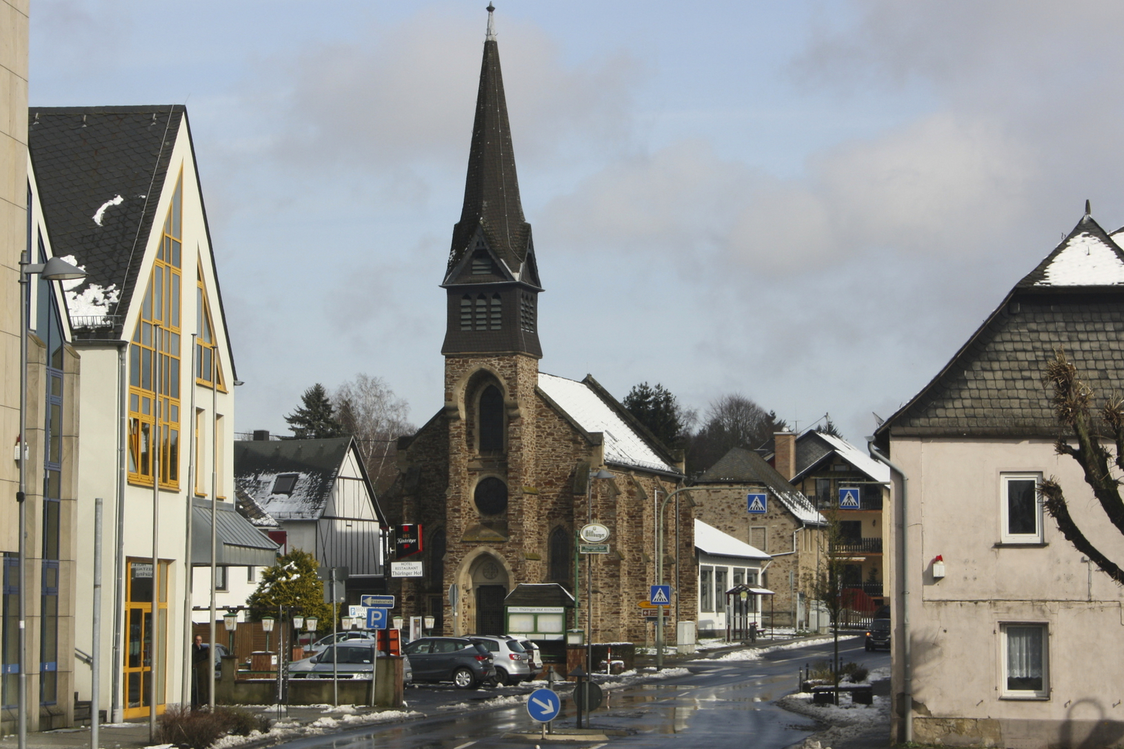 Neuhäusel, Westerwaldkreis, Rheinland-Pfalz, Deutschland